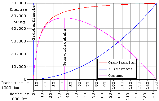 Die Energie-Bilanz beim Weltraumlift Um 1 kg Masse vom Äquator bis in eine Höhe von 35.786,012 km über dem Äquator hochzuheben, benötigt man 48.422,441 kJ. Wenn man das Seil bis in eine Höhe von 143.780,224 km über dem Äquator verlängert, dann kann man diese Energiemenge wieder zurückgewinnen. Im Diagramm wurde neben der Höhe über dem Äquator auch der Abstand vom Erdmittelpunkt dargestellt. Die Berechnungen dazu findet man hier.